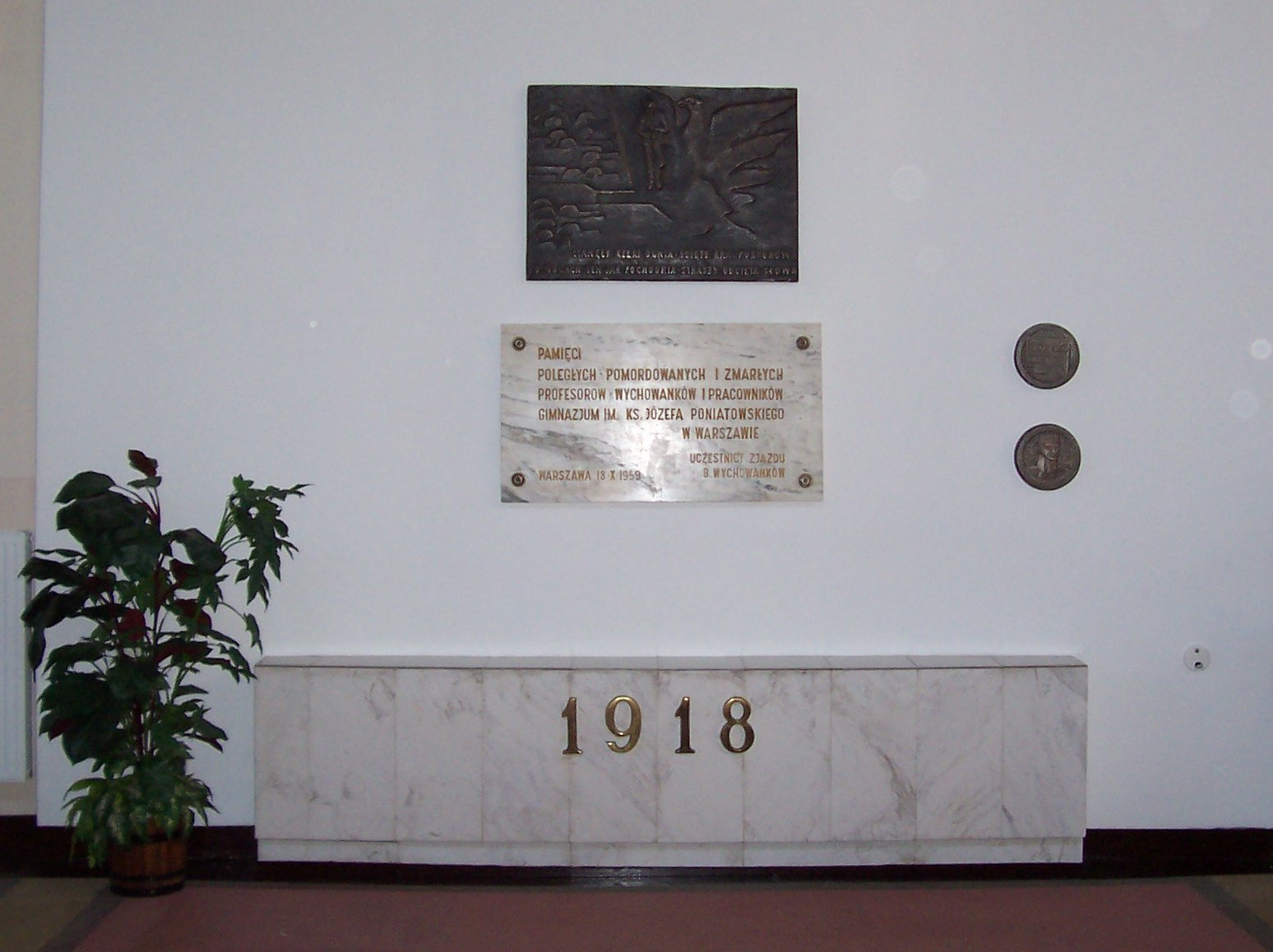 Tablica pamiatkowa wewnatrz V L.O. w Warszawie